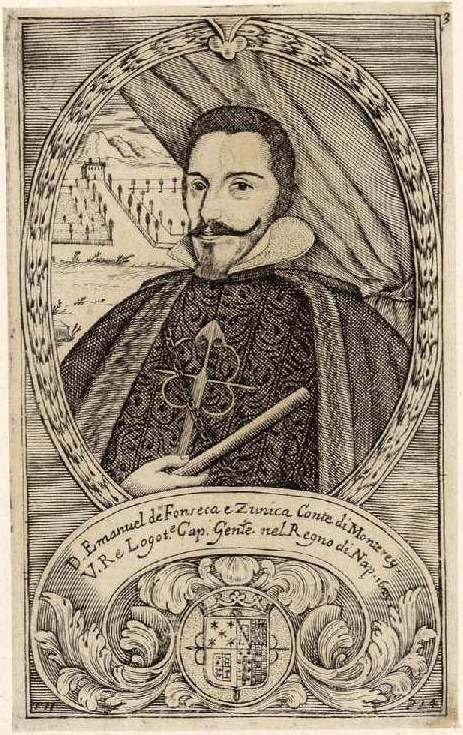 Manuel de Acevedo y Zúñiga. Grabado calcográfico anónimo recogido en Teatro eroico, e politico de'governi de'Vicere del Regno de Napoli, de Domenico Antonio Parrino, Nápoles, 1692-1695.